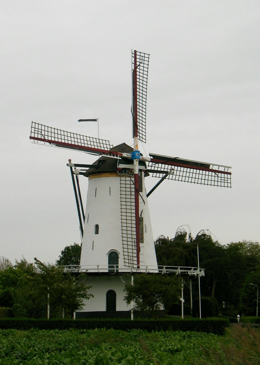 Kloetinge, Zeeland, stellingmolen